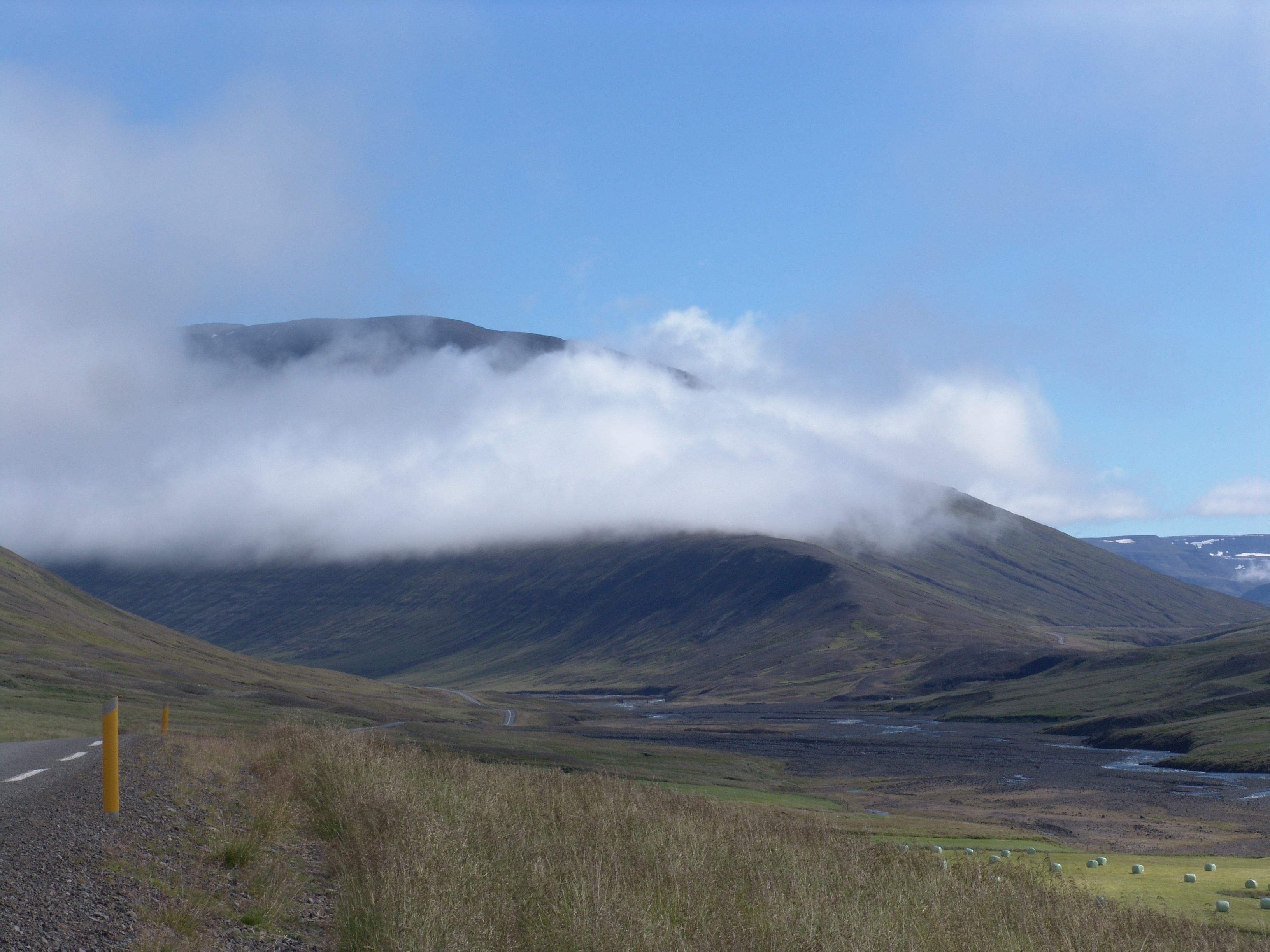 Iceland, Landschaft.